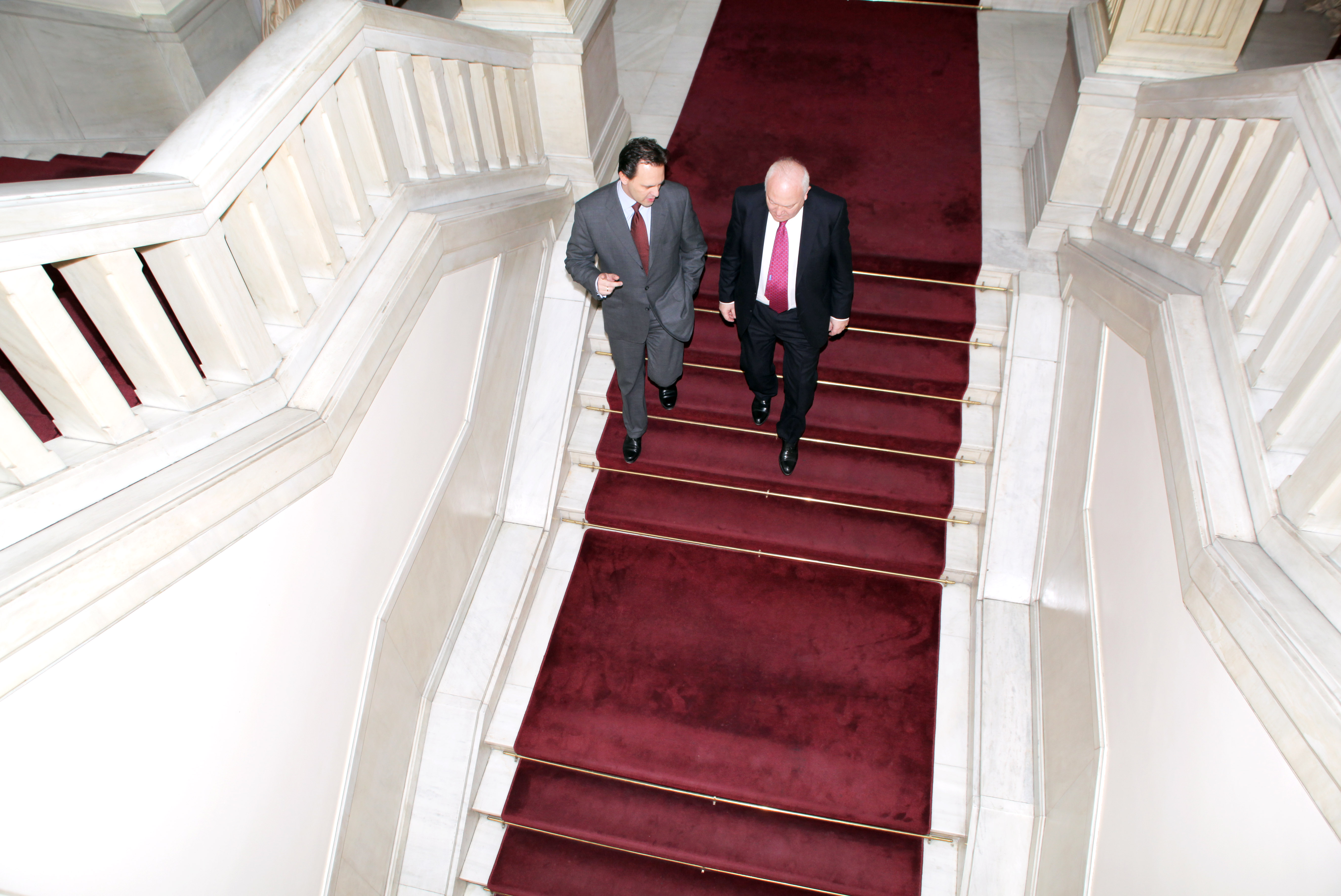 Tην Δευτέρα 7 Φεβρουαρίου 2011 και ώρα 13:30, ο Υπουργός Εξωτερικών Δημήτρης Δρούτσας συναντήθηκε στο Υπουργείο Εξωτερικών με τον Miguel Ángel Moratinos, τέως Υπουργό Εξωτερικών της Ισπανίας. On Monday 7 February 2011 at 13:30, the Minister of Foreign Affairs Dimitris Droutsas met with Miguel Ángel Moratinos, former Minister of Foreign Affairs of Spain at the Greek Ministry of Foreign Affairts.